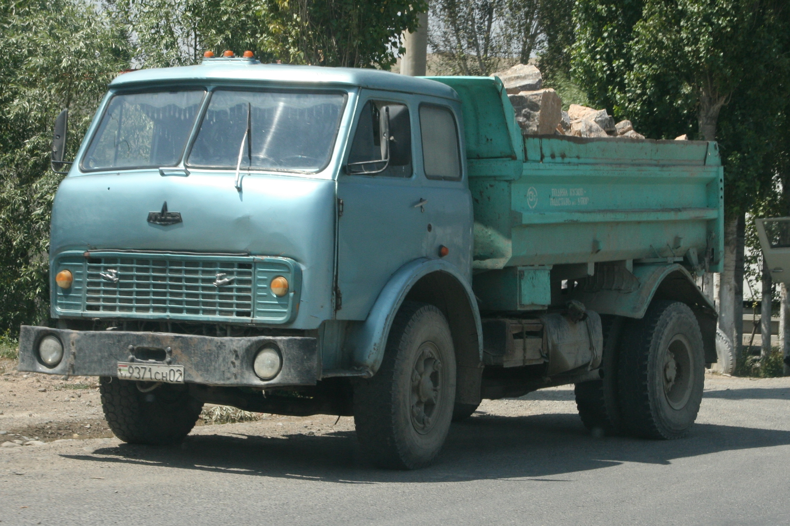 MAZ-5549 in Tadschikistan